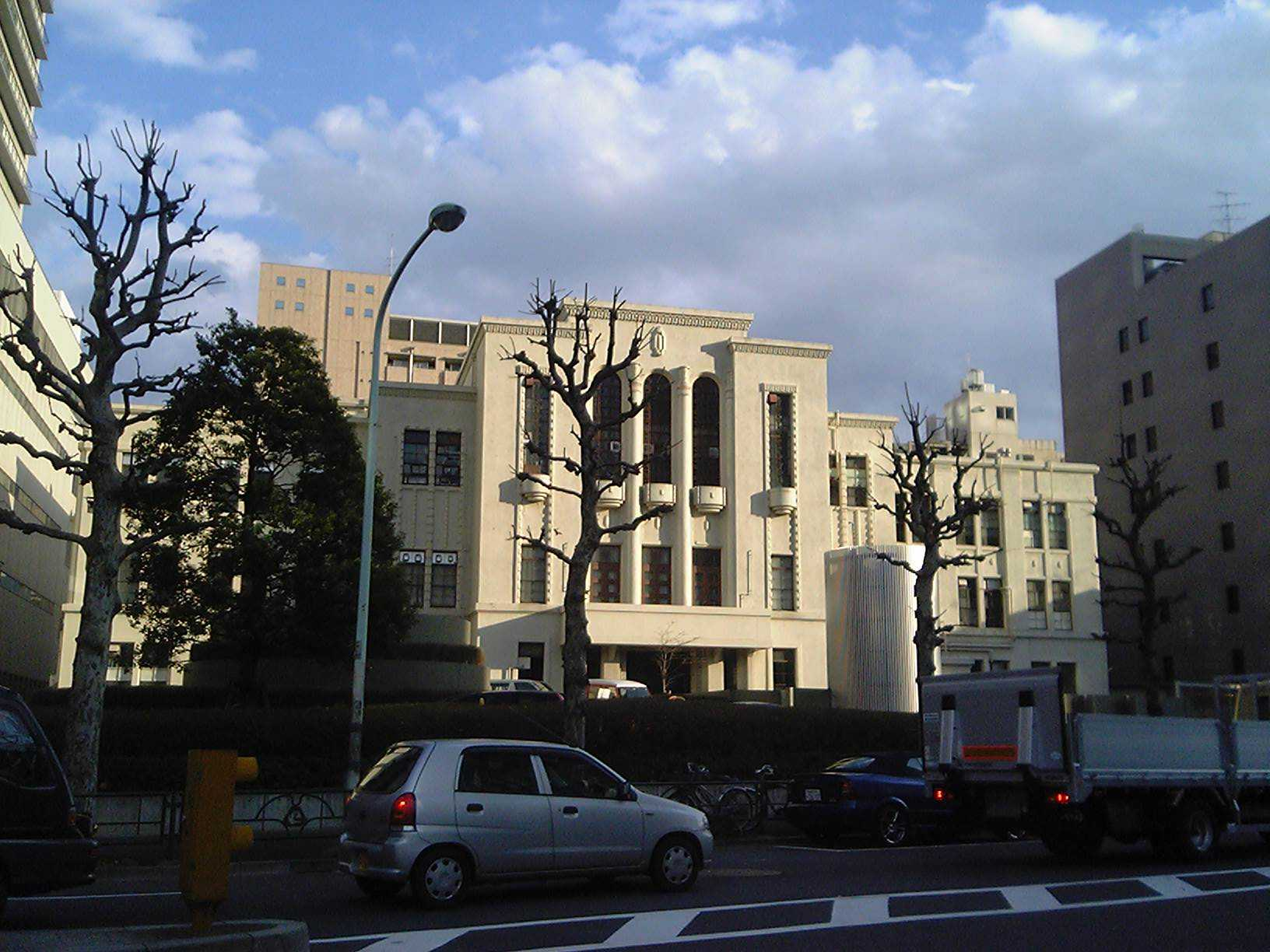 東京慈恵会医科大学